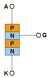 Door de uploader zelf vervaardigde afbeelding.